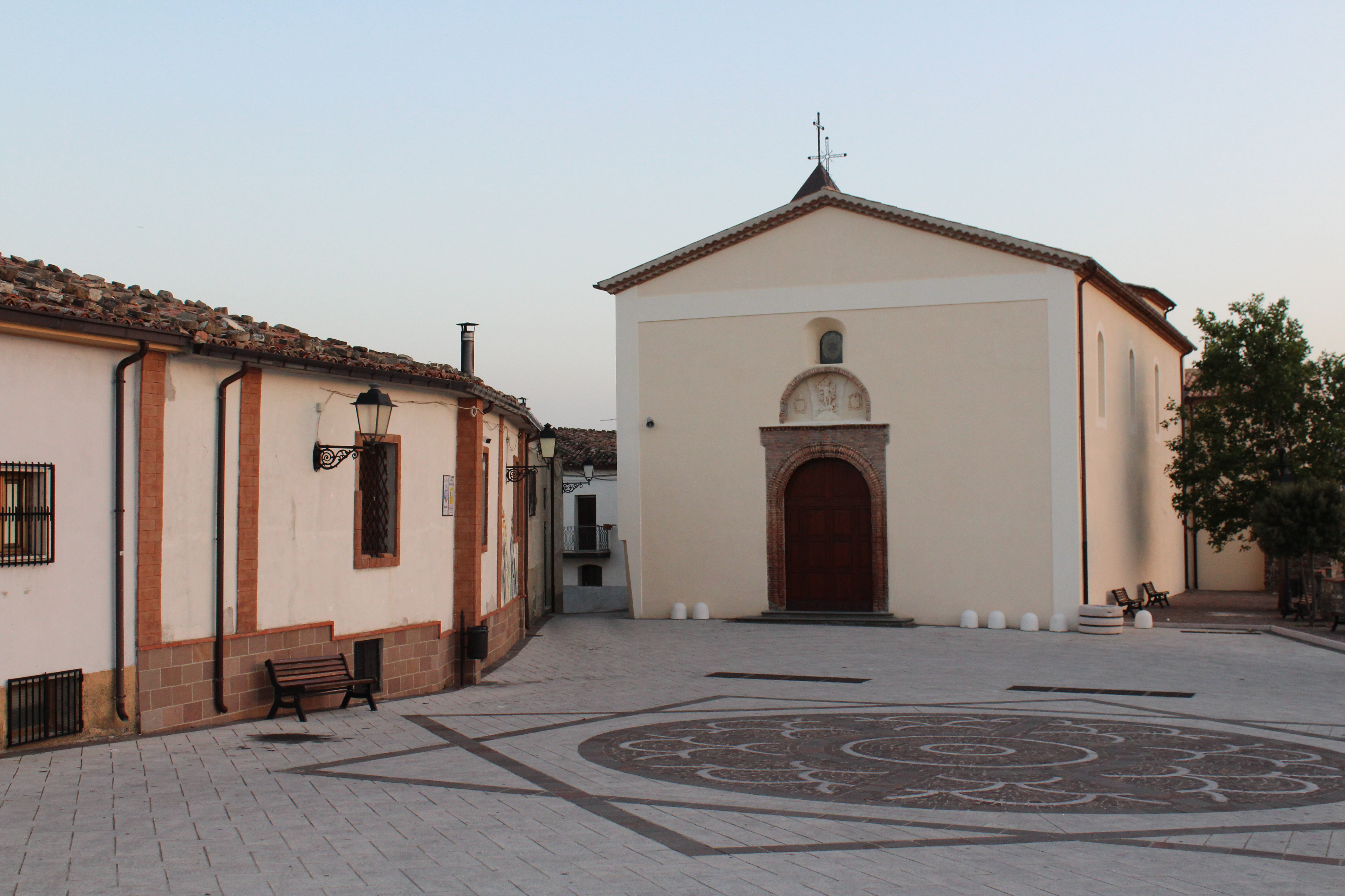 Piazza Castello con la Chiesa di San Michele Arcangelo e l'ex Municipio (oggi Biblioteca Comunale "S. Pertini").